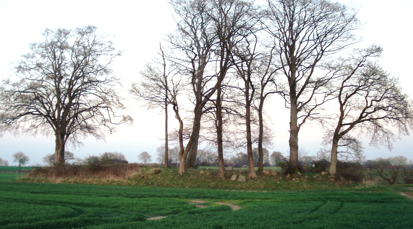 Langbetten bei Birkenmoor- Ost Sprockhoof-Nr 126